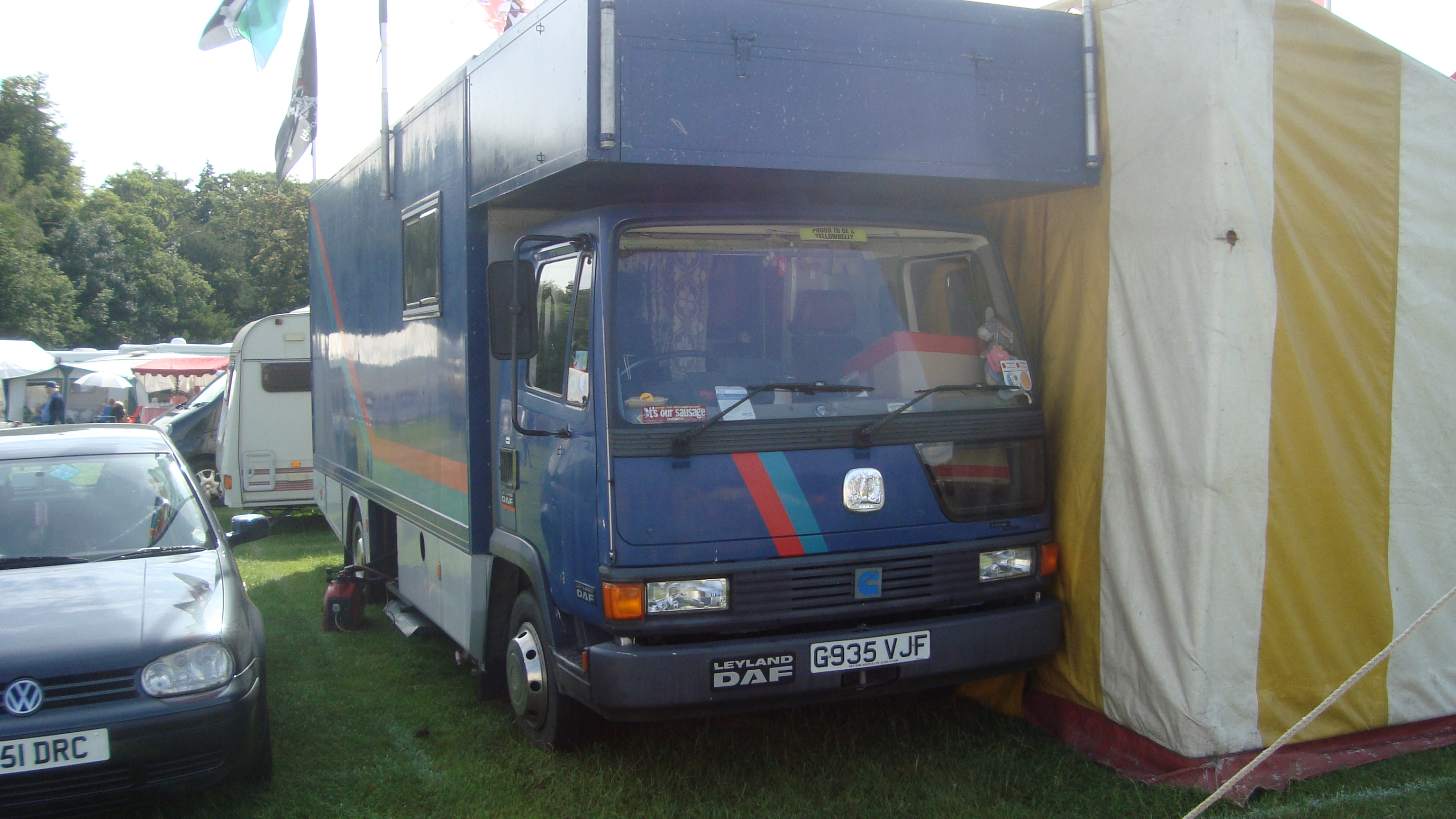 1989 Leyland Roadrunner